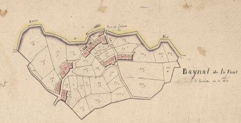 El Veïnat de la Font de Sant Llorenç de Cerdans en el Cadastre napoleònic del 1812 (Arxius Departamentals dels Pirineus Orientals)